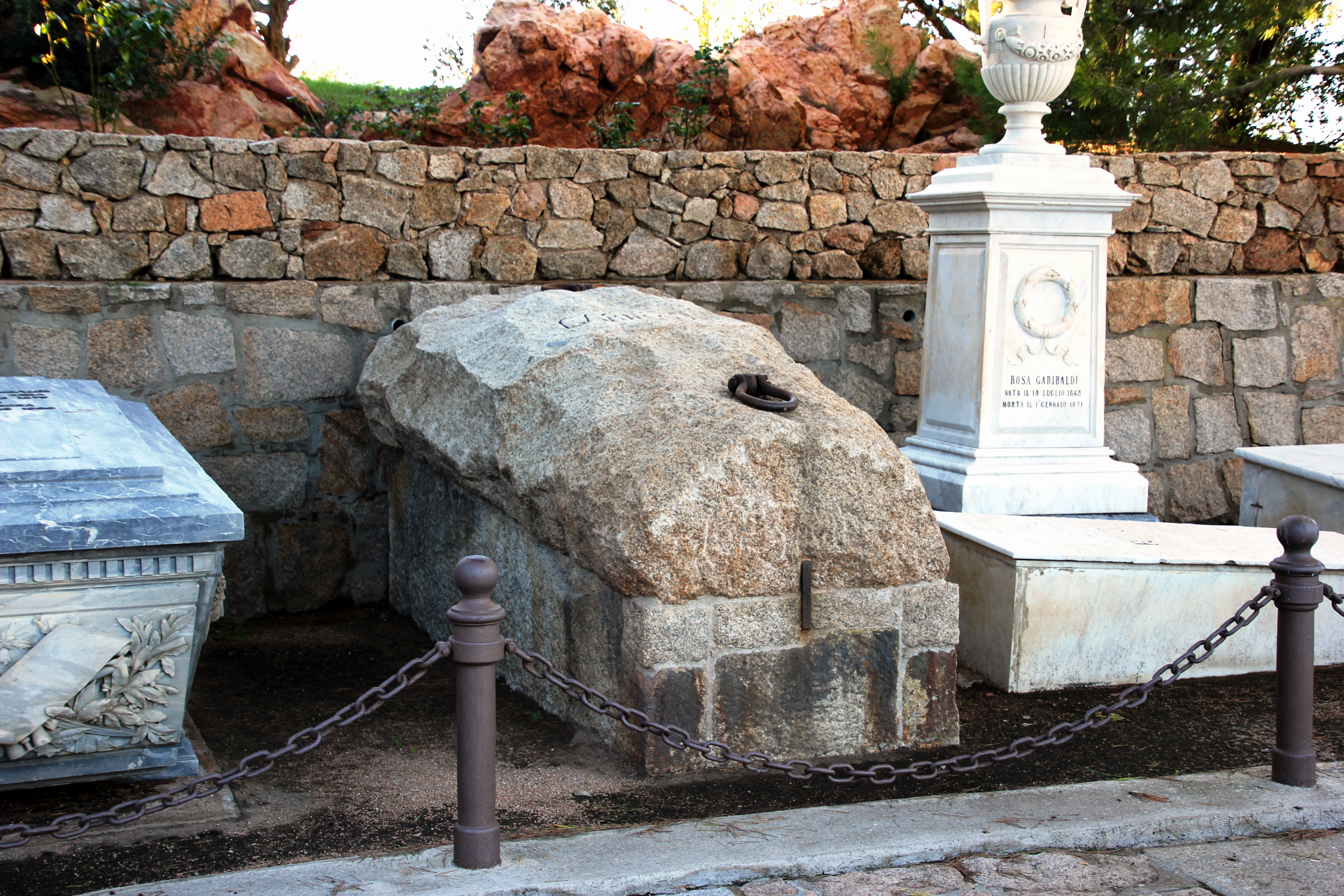 La Maddalena, compendio garibaldino di Caprera - Tomba di Giuseppe Garibaldi